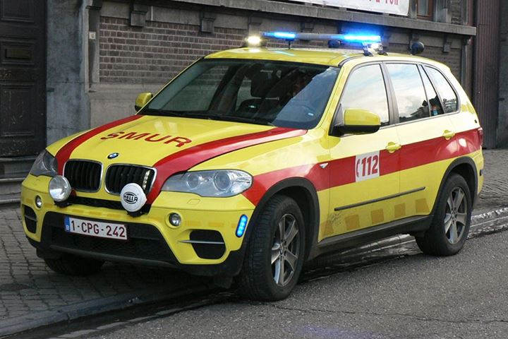 SMUR de Liège (Belgique) en intervention en 2013